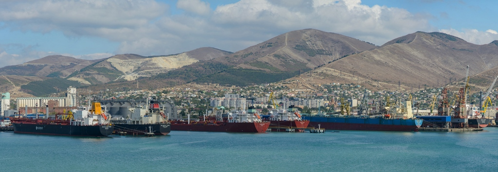 Порт